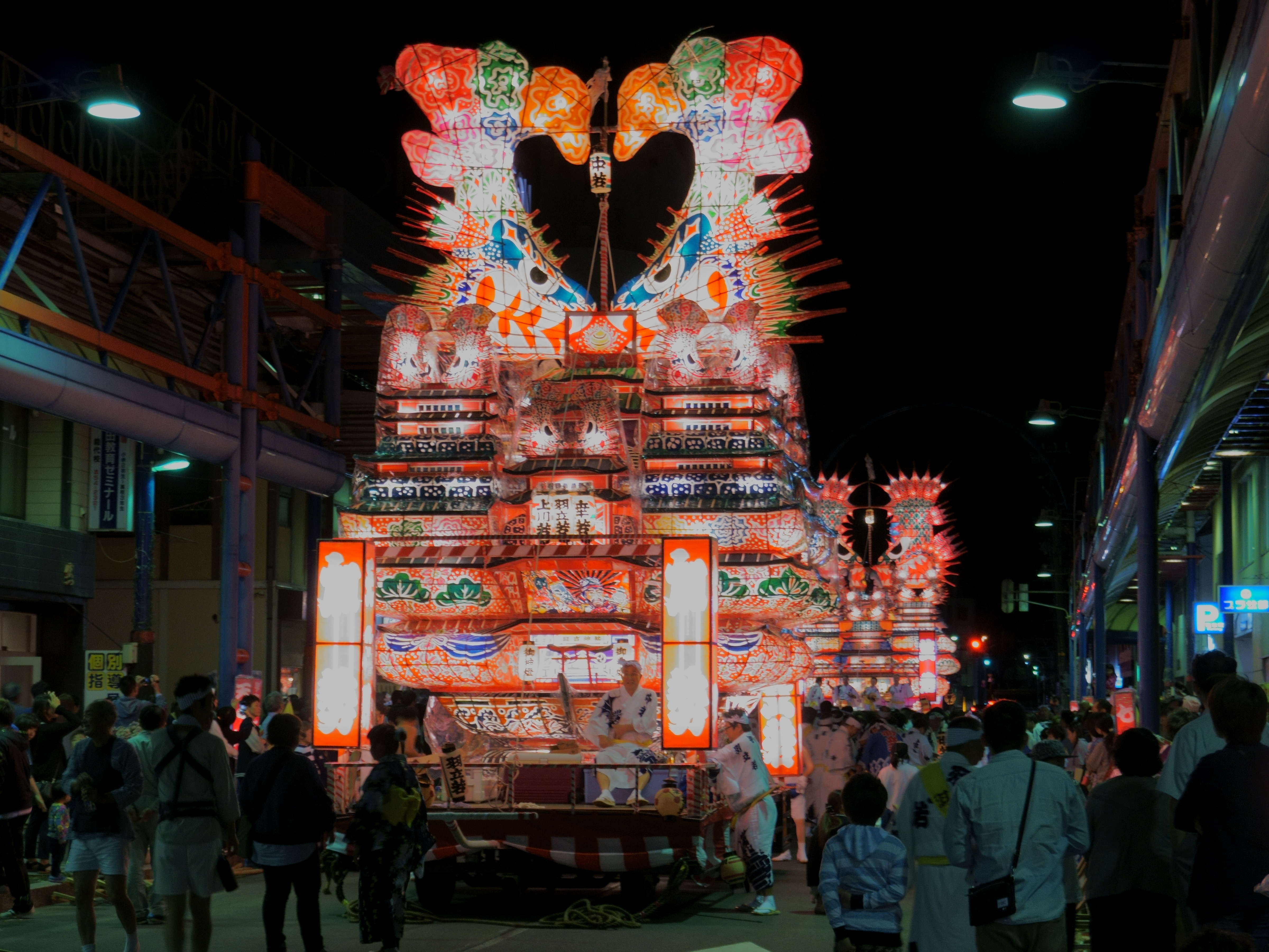 秋田県能代市の中心街で行われる伝統行事「能代役七夕」。2017年の運行は萬町組（あらまちぐみ）の担当で、萬若の燈籠と加勢丁の燈籠の2基が市内を練り歩いた。柳町商店街にて